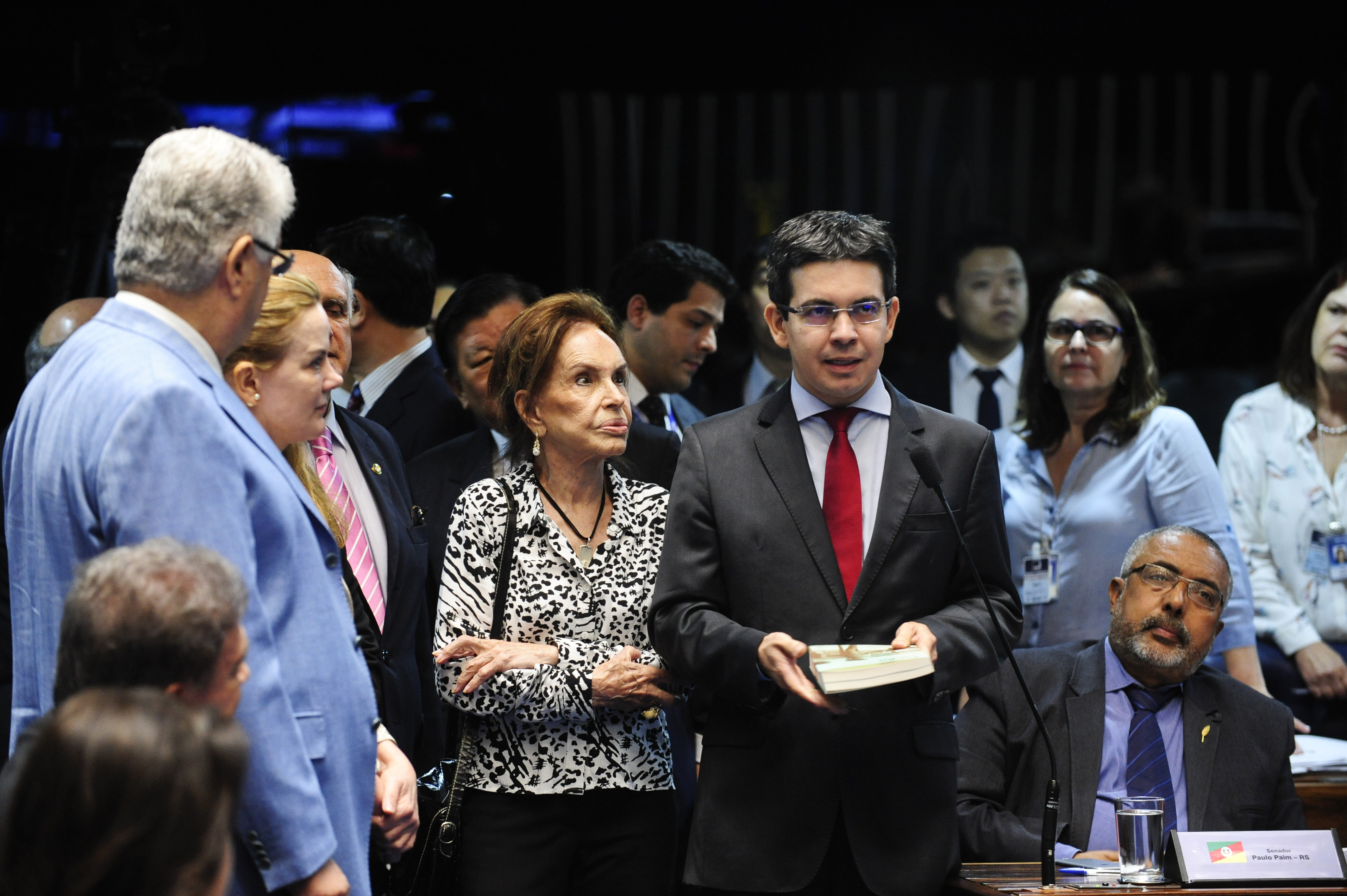 Plenário do Senado Federal durante sessão deliberativa extraordinária. Em pronunciamento, senador Randolfe Rodrigues (Rede-AP). À sua esquerda, Maria Thereza Fontella Goulart, viúva do ex-presidente João Goulart. Foto: Jonas Pereira/Agência Senado